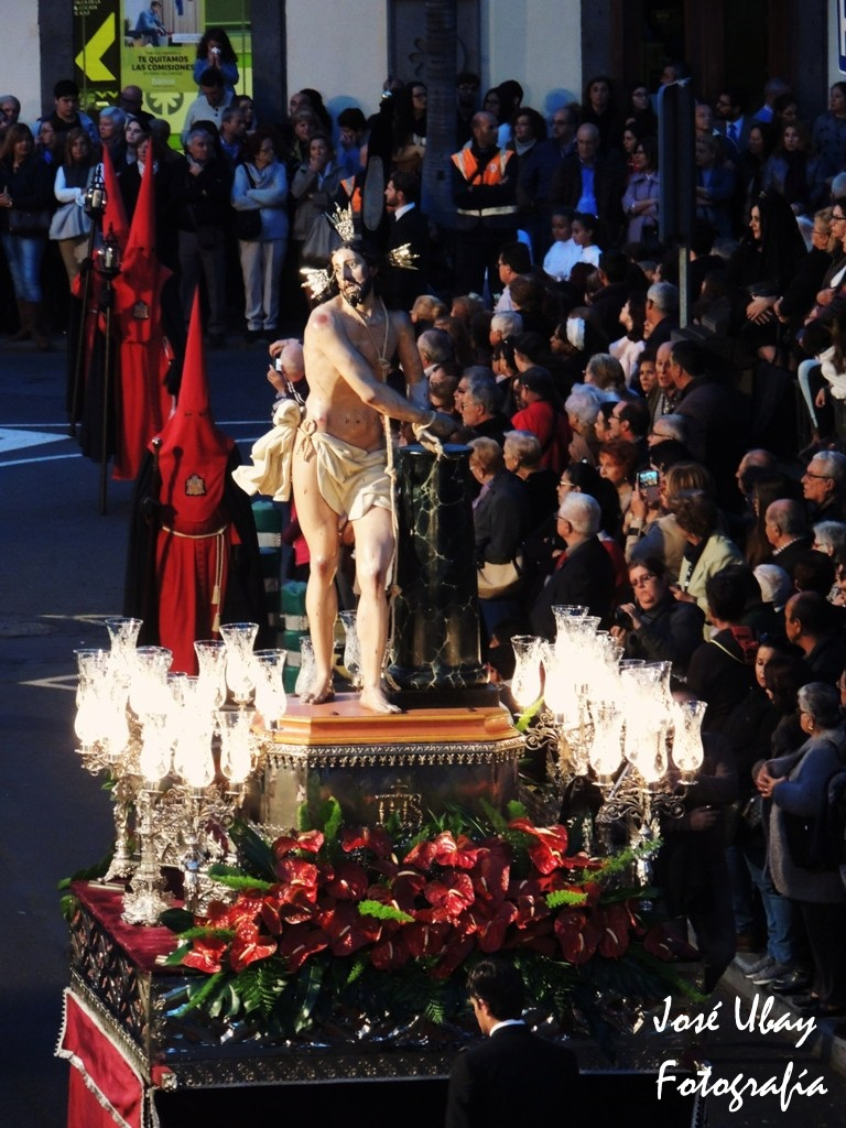 Santísimo Cristo del Granizo. Salida procesional 2016. Viernes Santo, 25 de marzo. Las Palmas de Gran Canaria.